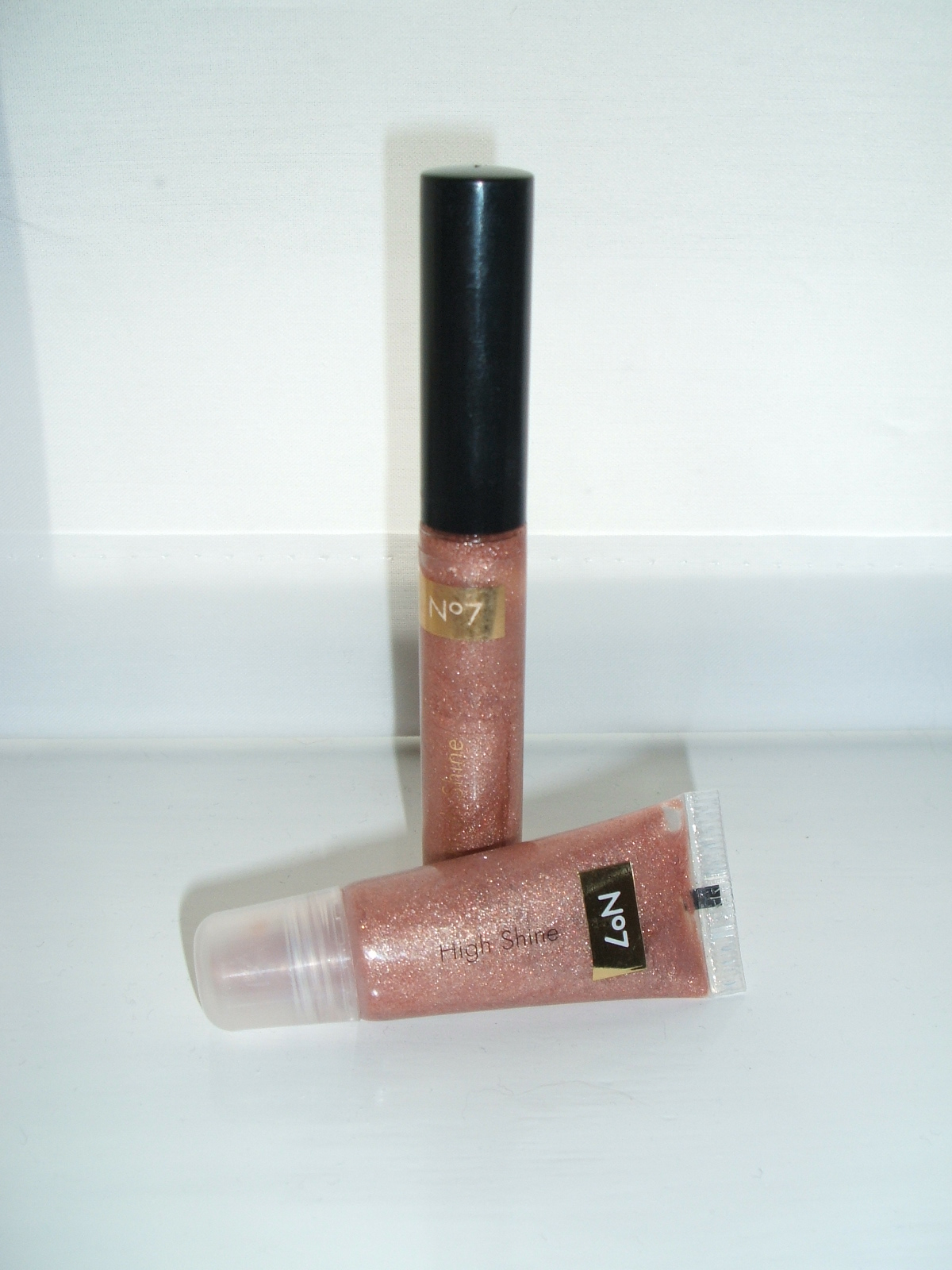 Lip Gloss